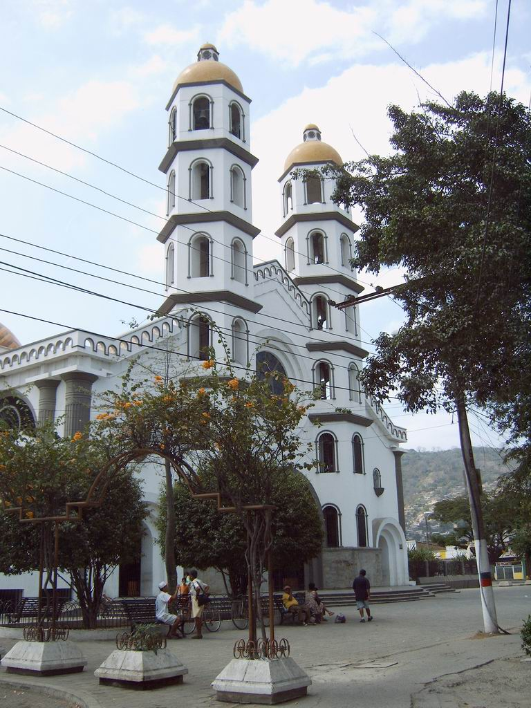 Catedral de Portoviejo, Ecuador